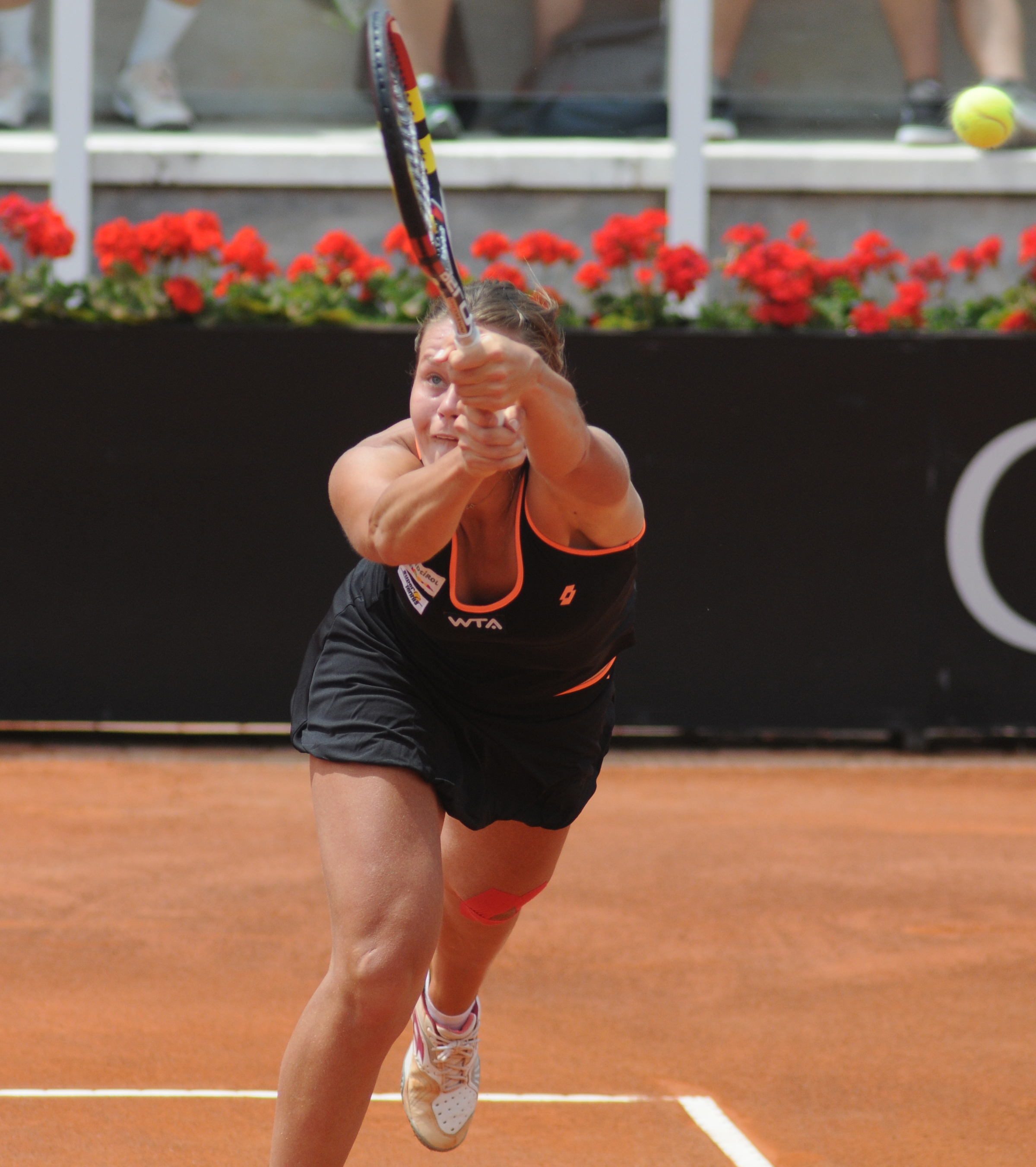 Karin Knapp at the 2014 Internazionali BNL d'Italia